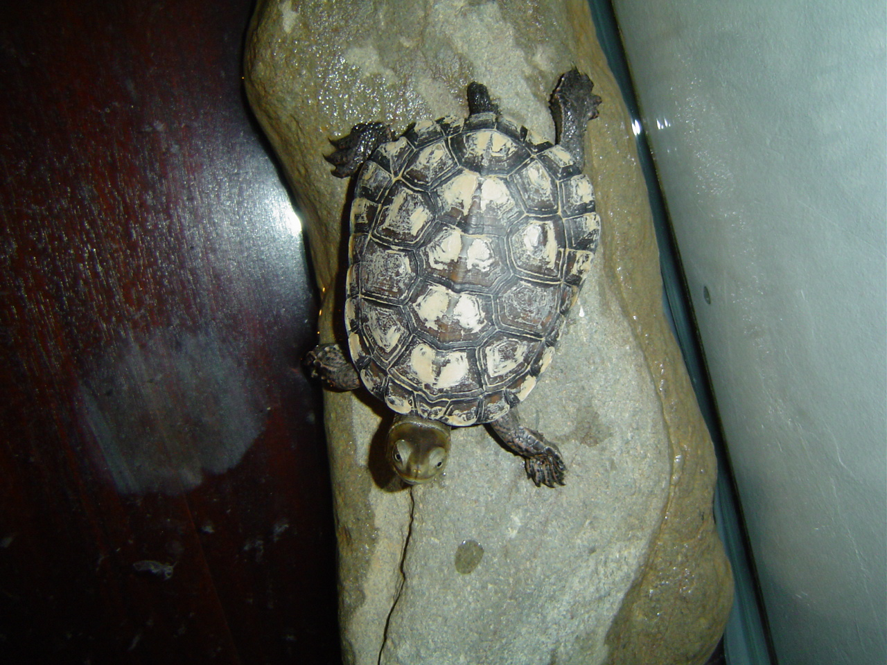 Mauremys leprosa (Galápago leproso). Córdoba, Spain